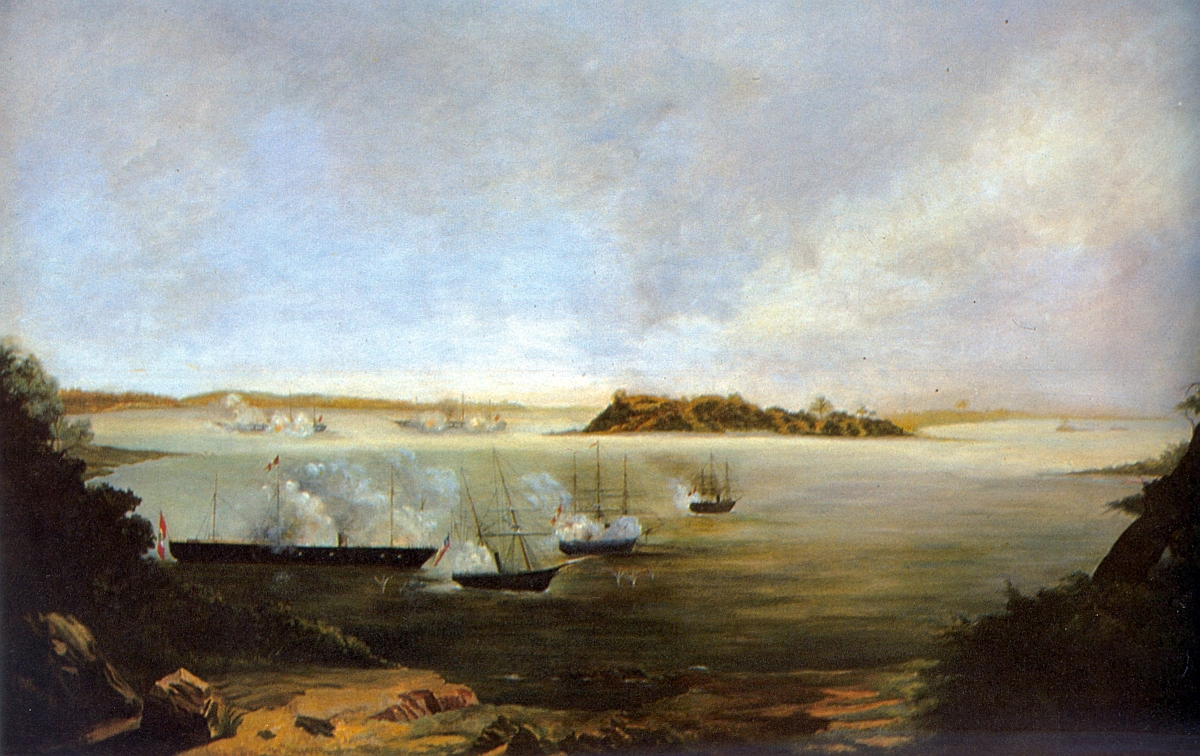 El combate naval de Abtao, focalizado desde el lado de los aliados.